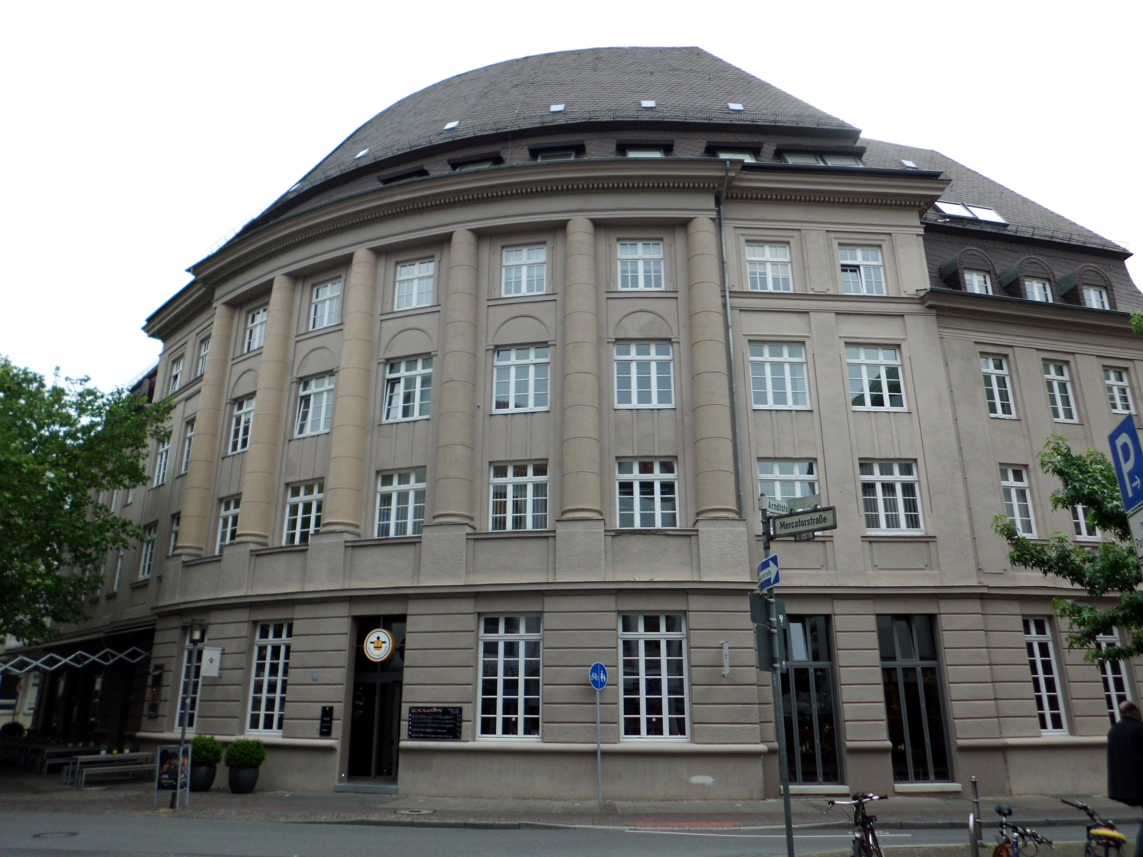 Bielefeld, Arndtstraße 8, ehemaliges Verlagshaus der „Volkswacht“, erbaut 1912, unter Denkmalschutz